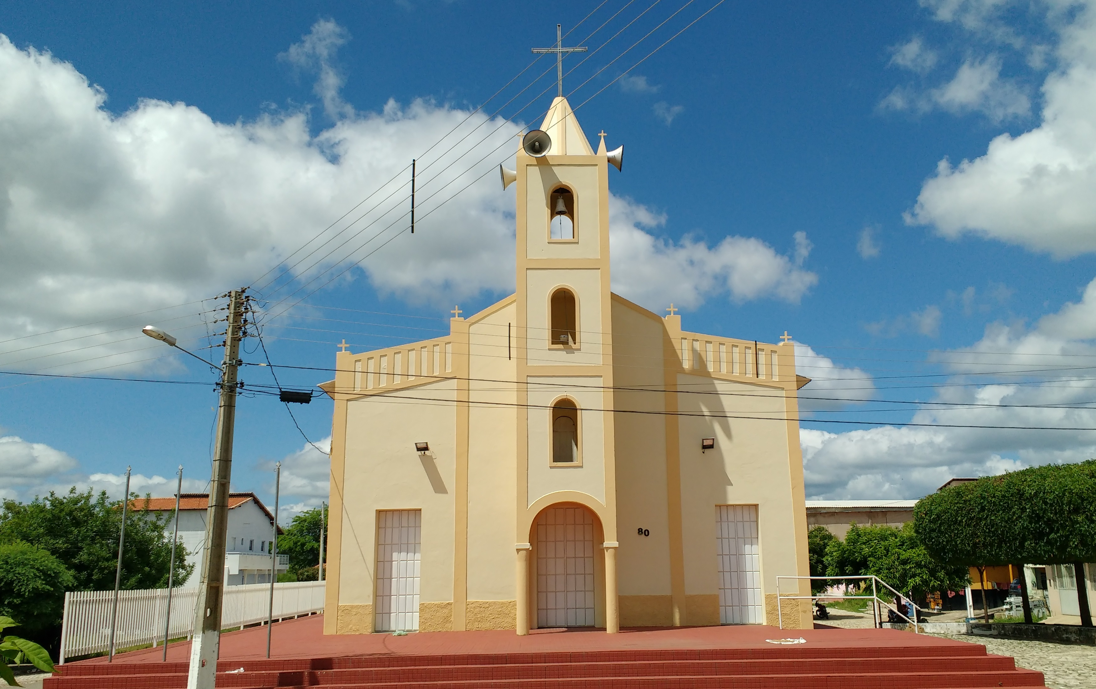 Capela São Francisco de Assis, da paróquia de Almino Afonso, em Lucrécia, Rio Grande do Norte (Brasil)